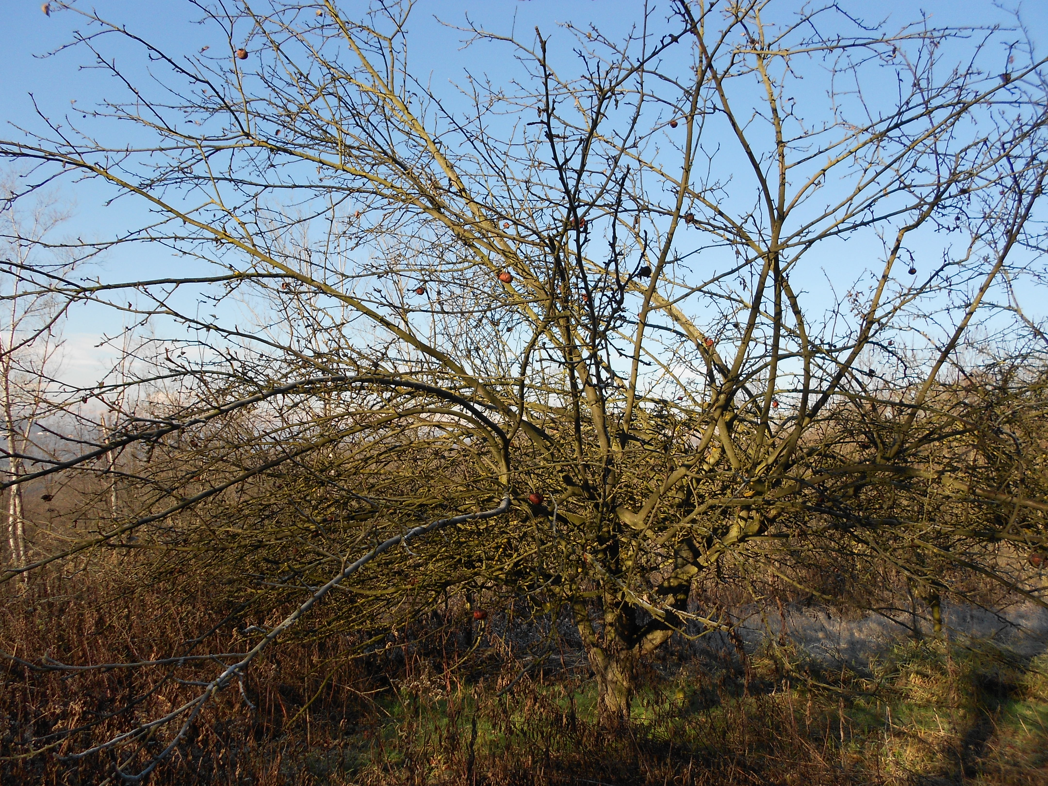 melo selvatico inverno